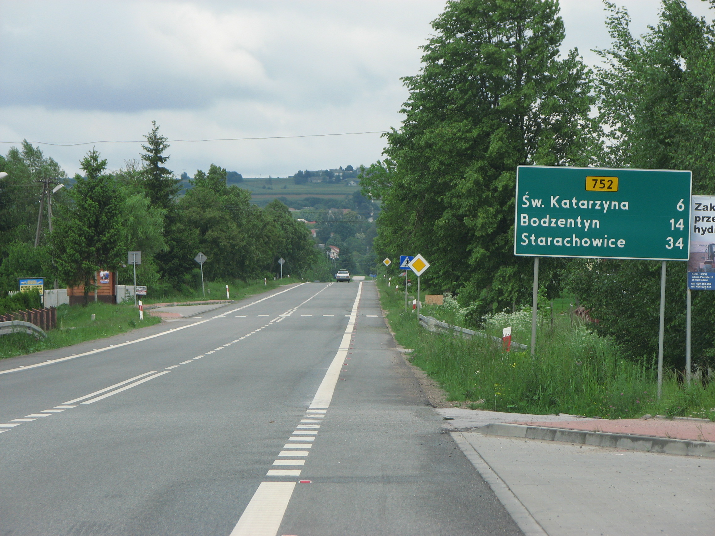 DW752 we wsi Górno – widok w stronę Bodzentyna.